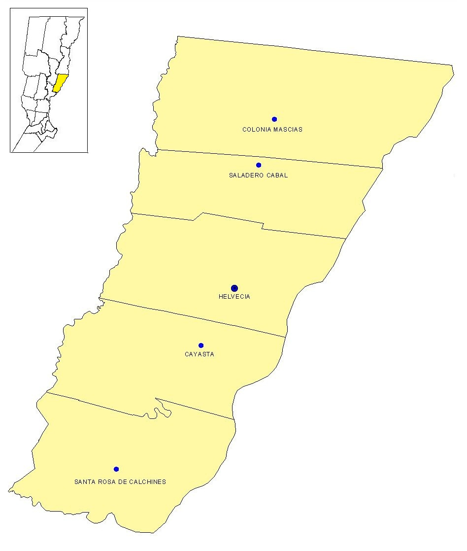 dpto g